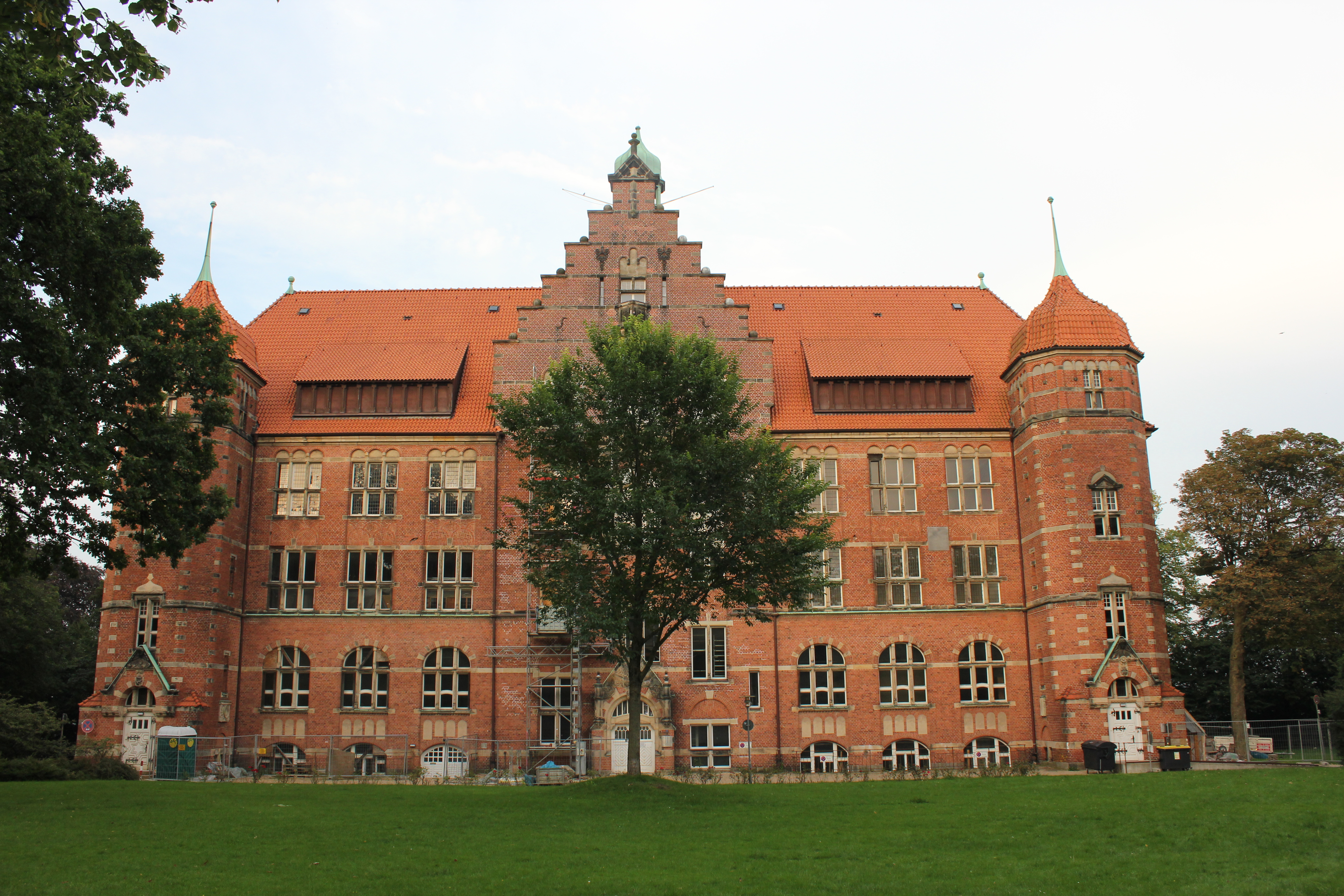 Altes Museum beziehungsweise Heinrich-Sauermann-Haus (Flensburg)